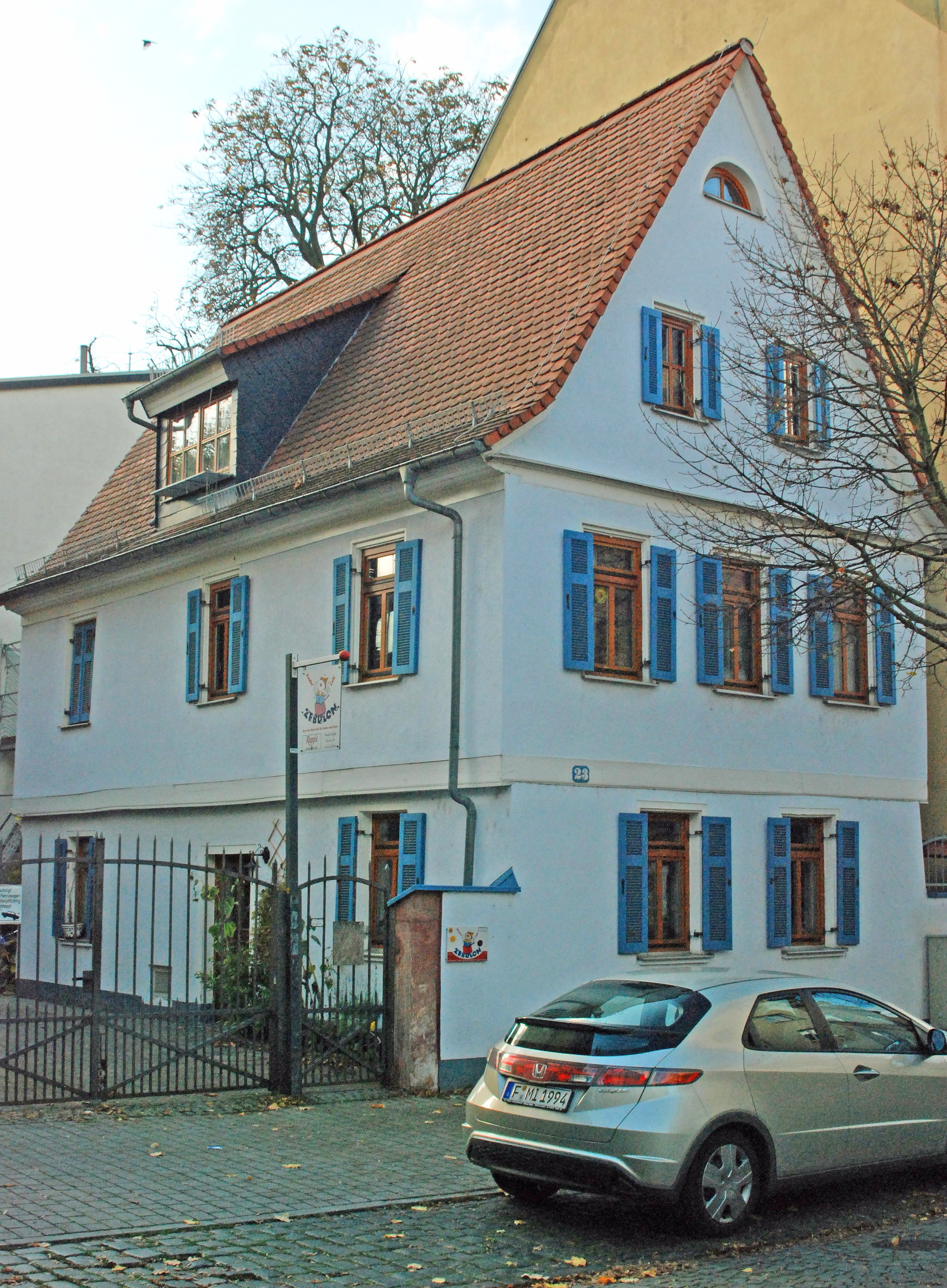 Frankfurt-Bockenheim, ehemaliges historisches Kirchengebäude der evangelisch-reformierten Gemeinde des Dorfes Bockenheim der Landgrafenschaft Hessen-Kassel in der jetzigen Grempstraße, heute Kinderhaus. Notwendig wurde dies historisches Kirchengebäude der evangelisch-reformierten Gemeinde, da 1533 In Frankfurt durch den Rat die lutherische Reformation eingeführt wurde. Nach 1554 fanden reformierte Glaubensflüchtlinge Aufnahme in der Stadt, auf die eine deutsch-reformierte und eine französisch-reformierte Gemeinde in Frankfurt zurückgehen. Trotz Repressalien des lutherischen Rats und der lutherischen Geistlichkeit blieben beide Gemeinden erhalten. Erst durch drohenden Machtverlust des Rats und steigenden wirtschaftlichen Einfluss der immigierten reformierten Glaubensflüchtlinge, wurde ihnen 1787 die Abhaltung eigener Gottesdienste in ihren Bethäusern erlaubt; mit der Abdankung des letzten Kaisers des Heiligen römischen Reichs deutscher Nation 1806 und dem Ende der Freien Reichsstadt erhielten die reformierten und katholischen Konfessionen die volle Gleichstellung mit der lutherischen Kirche.